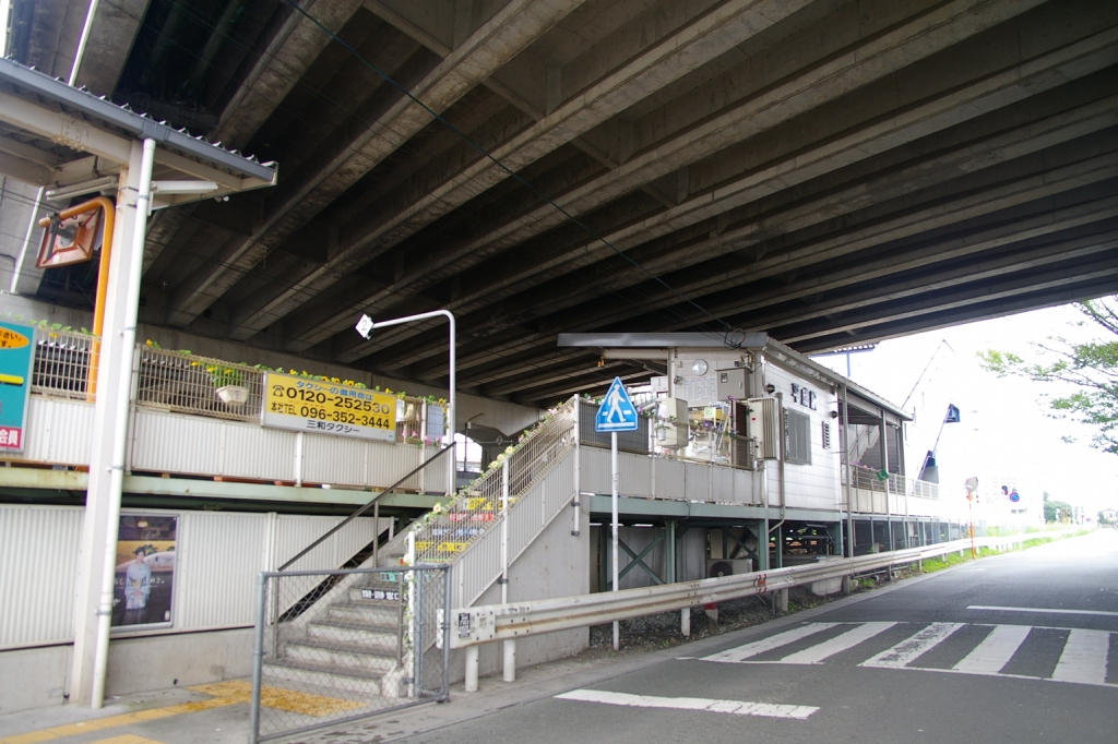 撮影：takasunrise0921